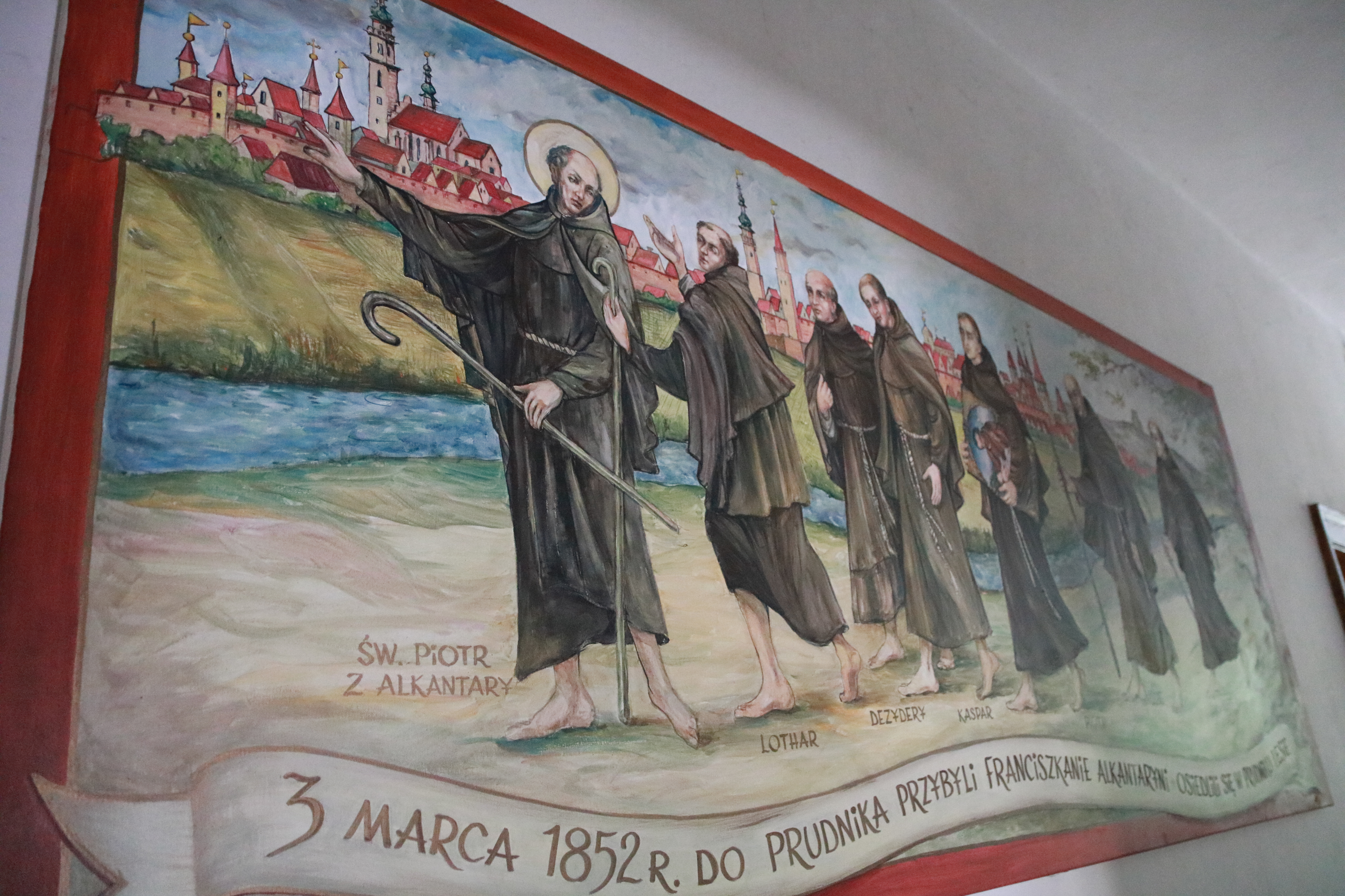 Uroczystość odpustowe NMP Anielskiej z Porcjunkuli-Sanktuarium św. Józefa w Prudniku-Lesie | Abp Marek Jędraszewski | 5.08.2018